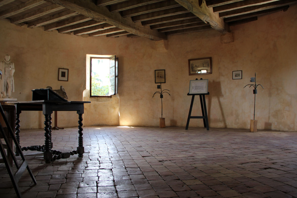 Bureau où écrivait Montaigne, dans sa Tour.